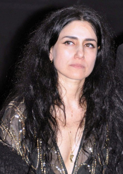 Ronit Elkabetz à l'avant-première du film Tête de turc